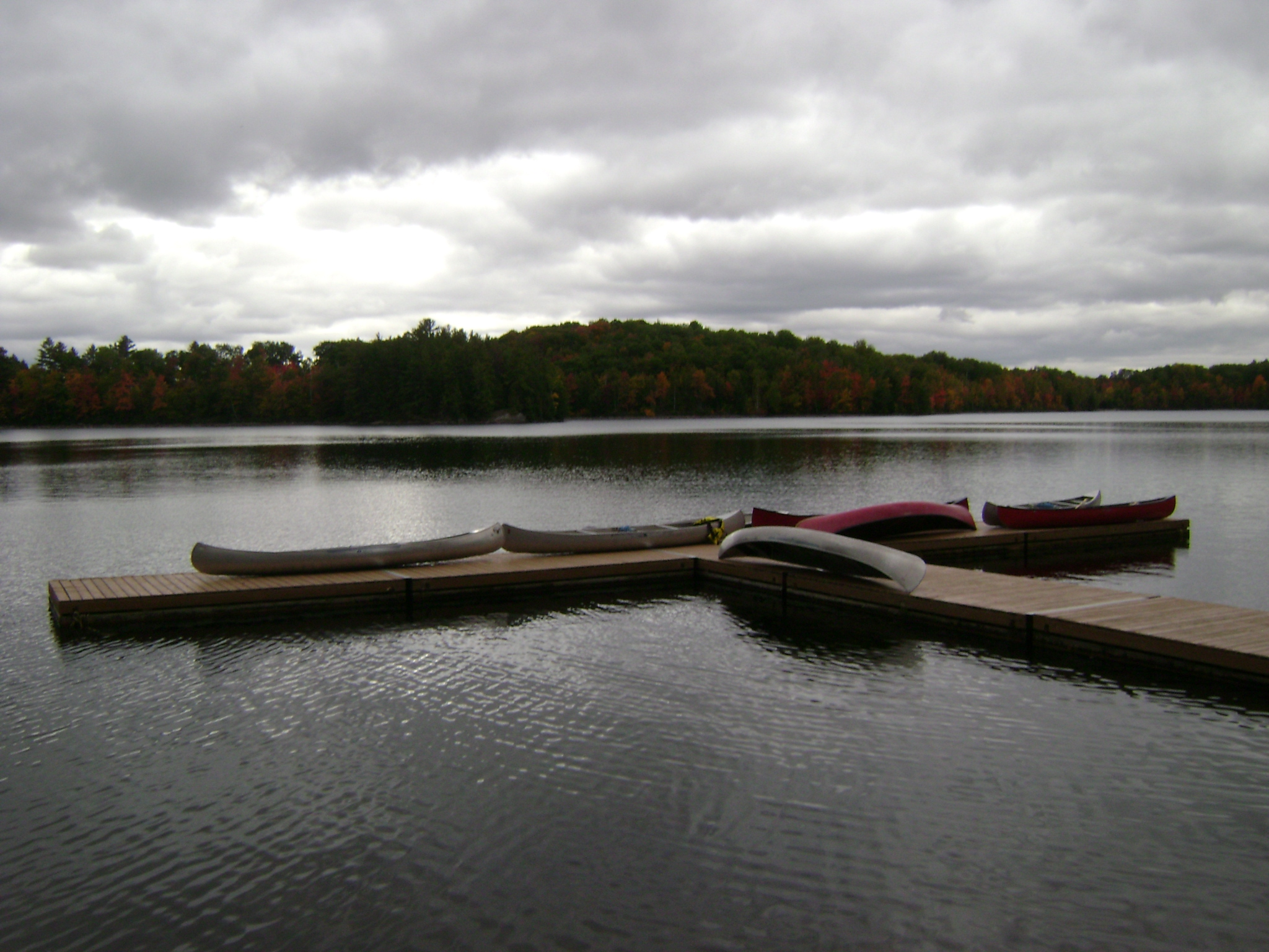 Cais de canoagem em um acampamento em Ontário, Canadá.